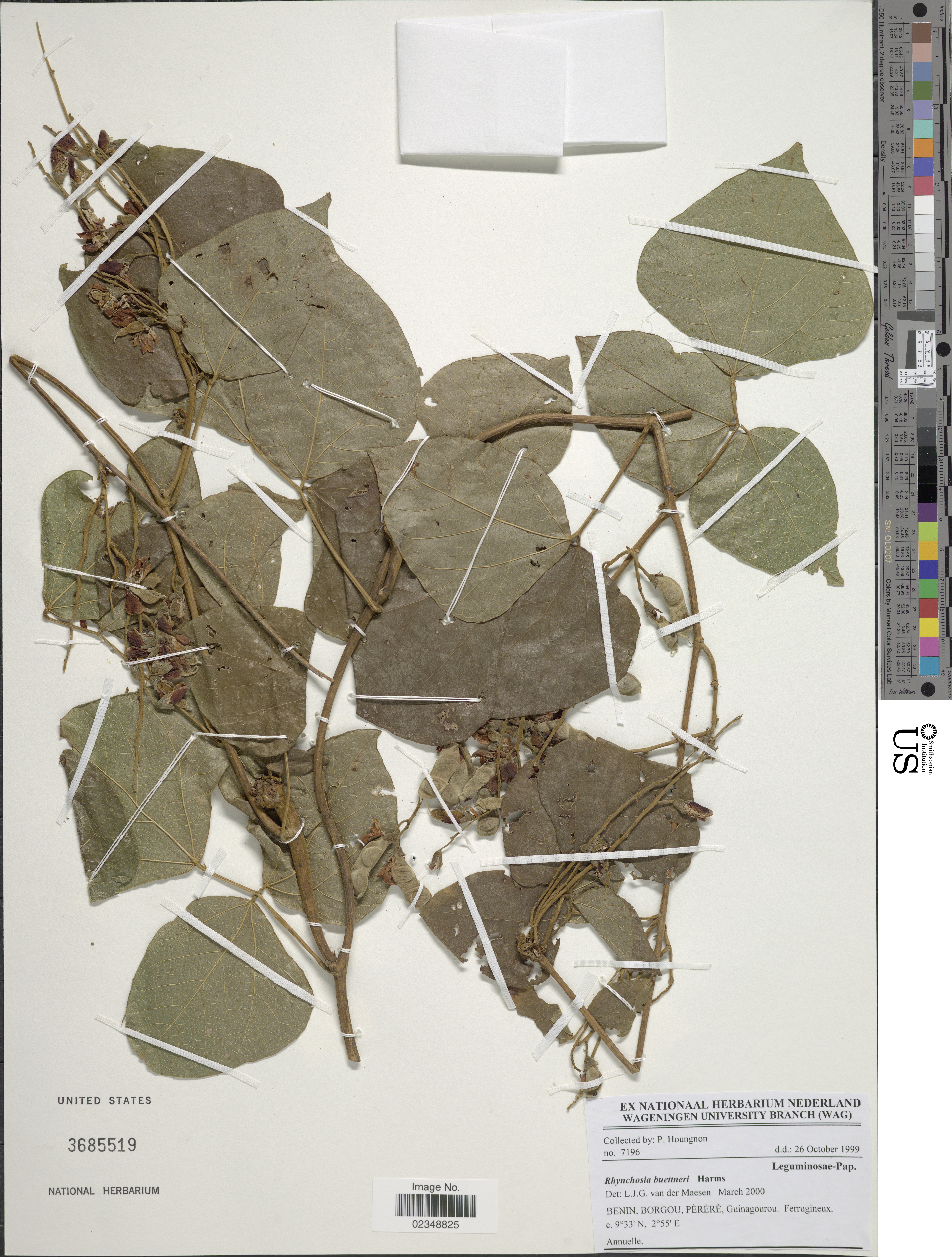 Rhynchosia buettneri Harms Object Details Biogeographical Region 22 - West Tropical Africa Collector P. Houngnon Record Last Modified 3 Nov 2017 Specimen Count 1 Collection Date 26 Oct 1999 Barcode 02348825 USNM Number 3685519 Place Benin, Borgou, Pèrèrè, Guinagourou. Ferrugineux, Borgou, Benin, Africa Published Name Rhynchosia buettneri Harms Taxonomy Plantae Dicotyledonae Rosales Fabaceae Faboideae NMNH - Botany Dept. Record ID nmnhbotany_13652754 Usage of Metadata (Object Detail Text) CC0 GUID (Link to Original Record)